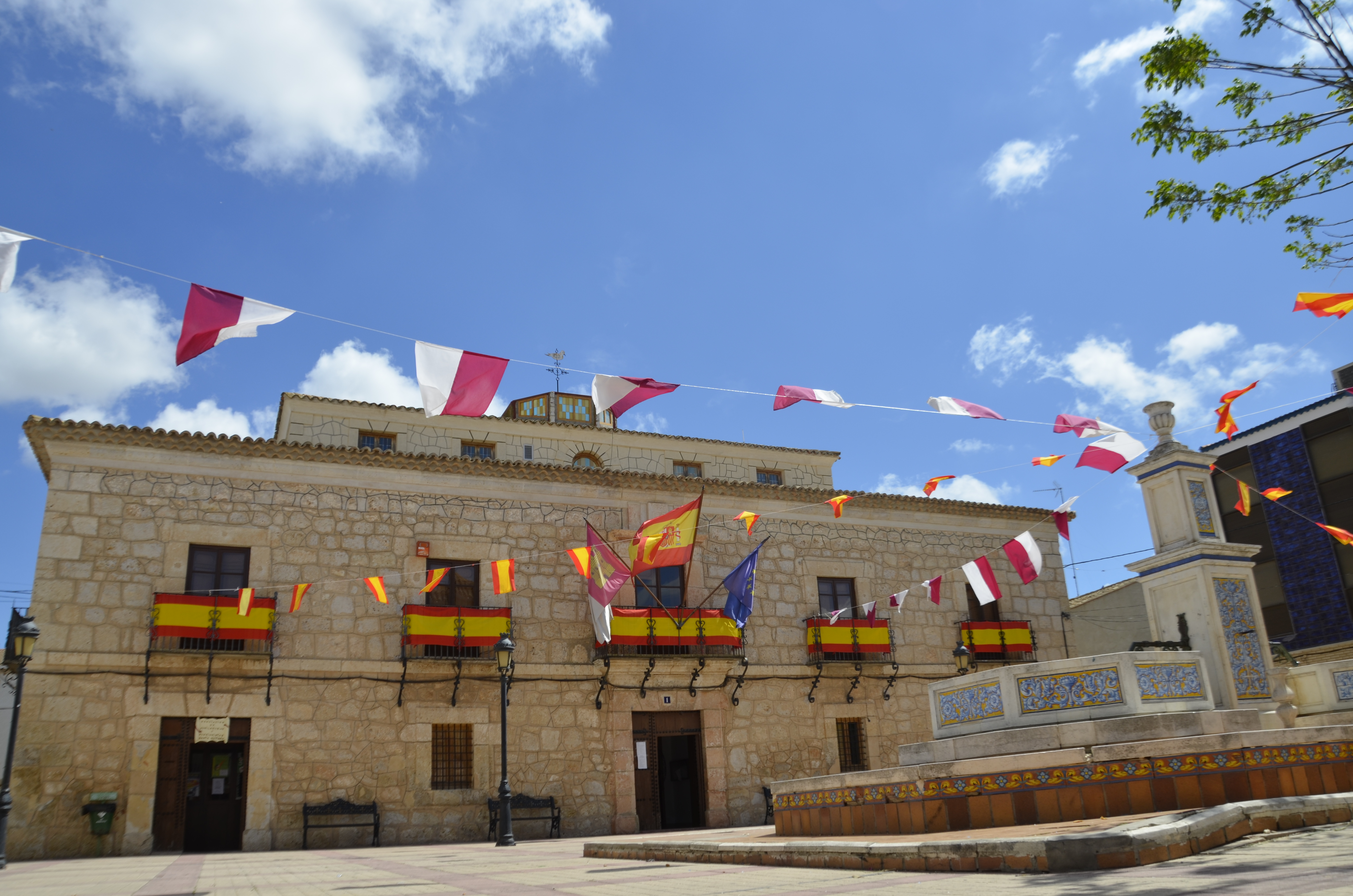 Ayuntamiento de Casas de Ves visto desde la Plaza Mayor